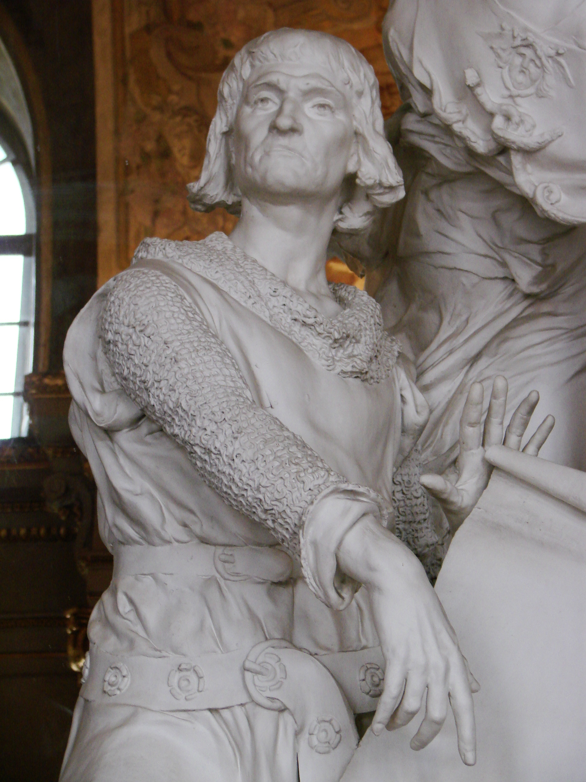 Salle des illustres au Capitole de Toulouse, ville de Toulouse, région Midi-Pyrénées (France) : Raymond VI annonce à la ville de Toulouse la mort de Simon de Montfort 1218, Labatut.